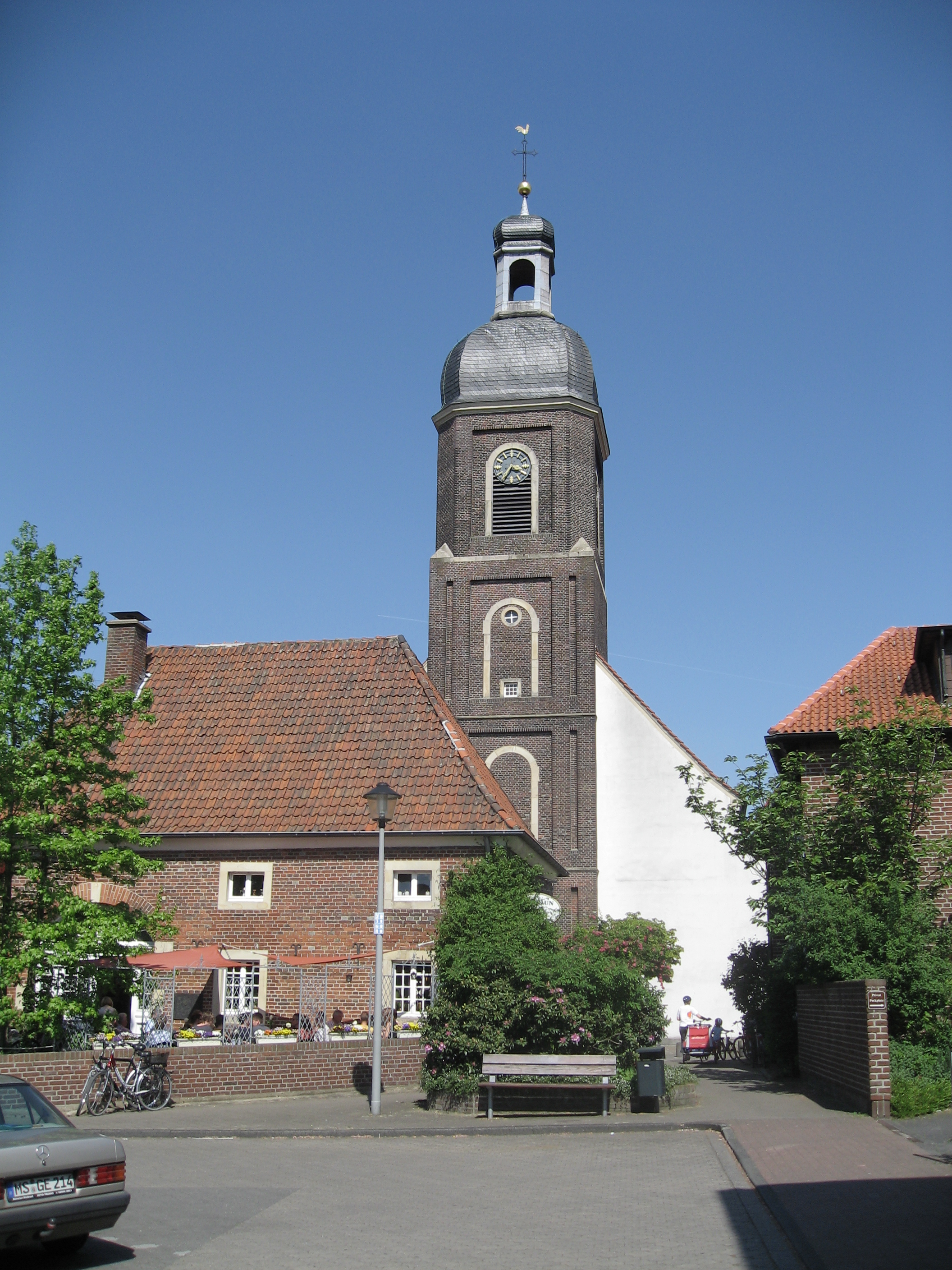 Kreis Coesfeld, Nordkirchen, katholische Kirche St. Mauritius, ab 1715 von Gottfried Laurenz Pictorius als barocke Hallenkirche erbaut, im Vordergrund das Schlaun Café, ursprünglich als Vikarienhaus erbaut